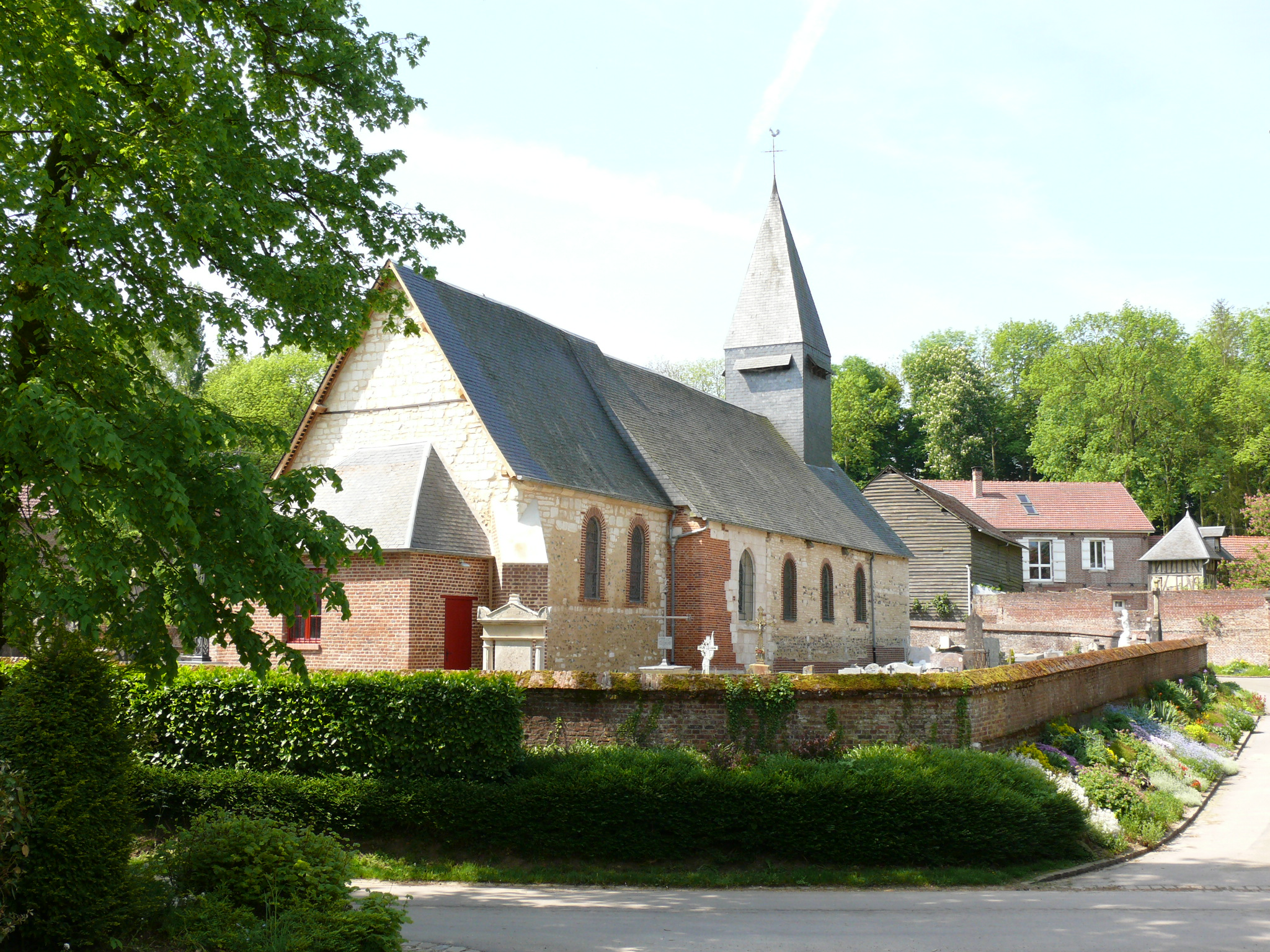 Oursel-Maison (Oise - Picardie - France) : Église Saint-Nicolas et Saint-Blaise